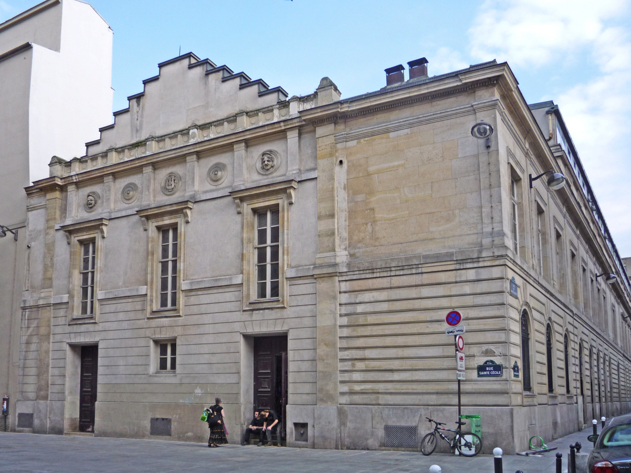 Théâtre du Conservatoire / Conservatoire national d'Art dramatique; 2bis, rue du Conservatoire, Paris, 9e arr